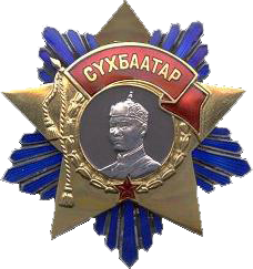 Орден Сухэ_Батора